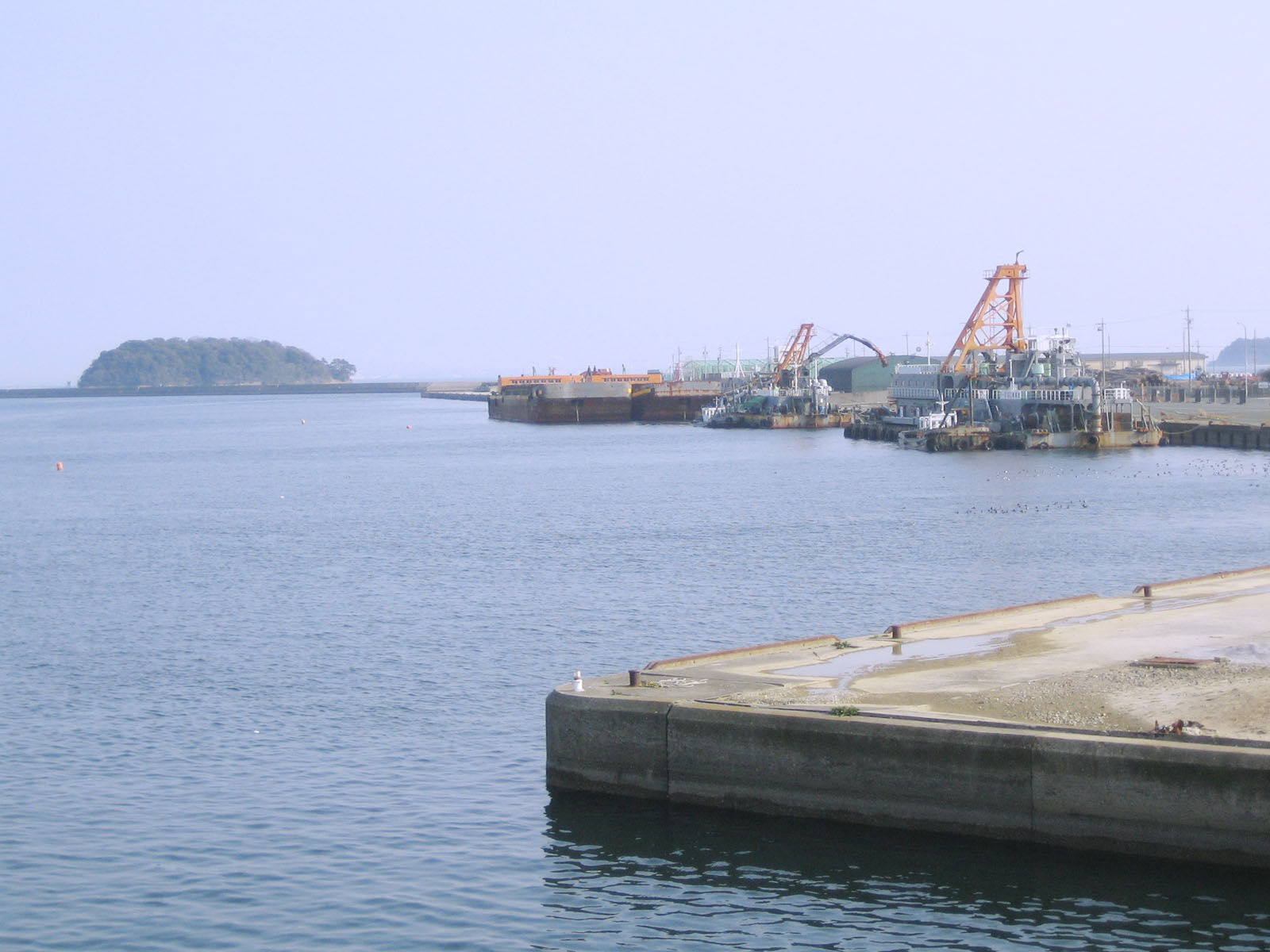 Takeshima Wharf (竹島埠頭), in Gamagori, Aichi, Japan